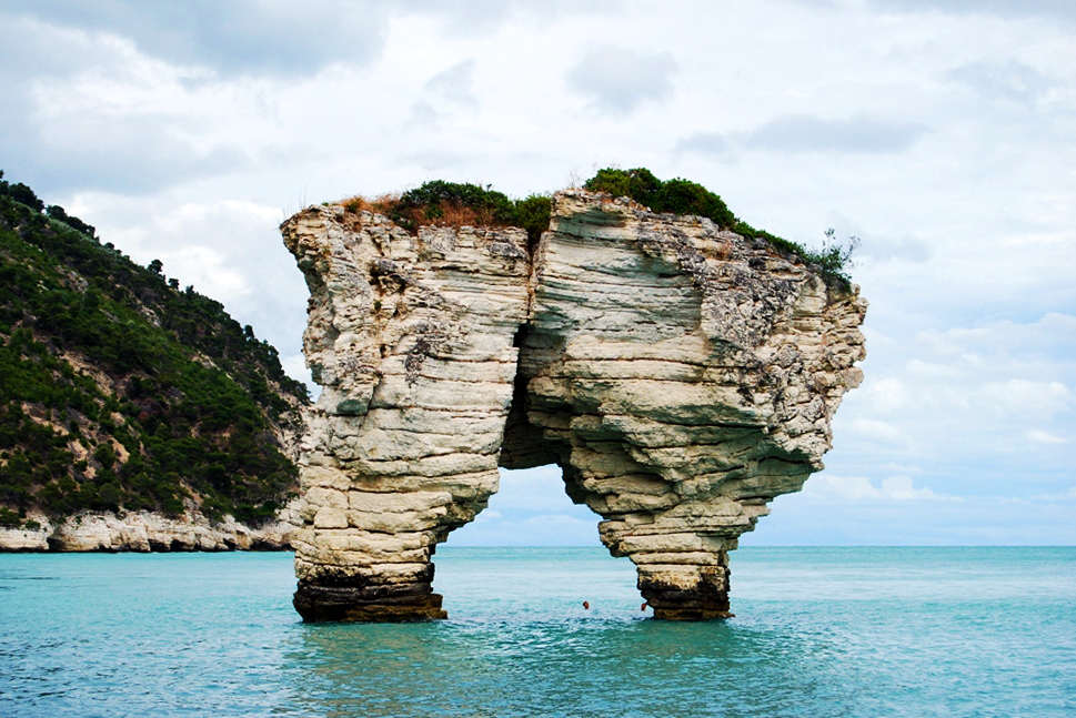 Faraglione di Baia dei Mergoli (o delle Zagare) a Mattinata (Foggia), Parco del Gargano